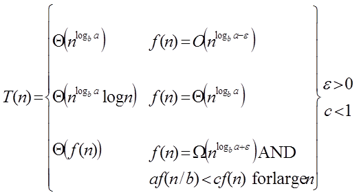 Master theorem